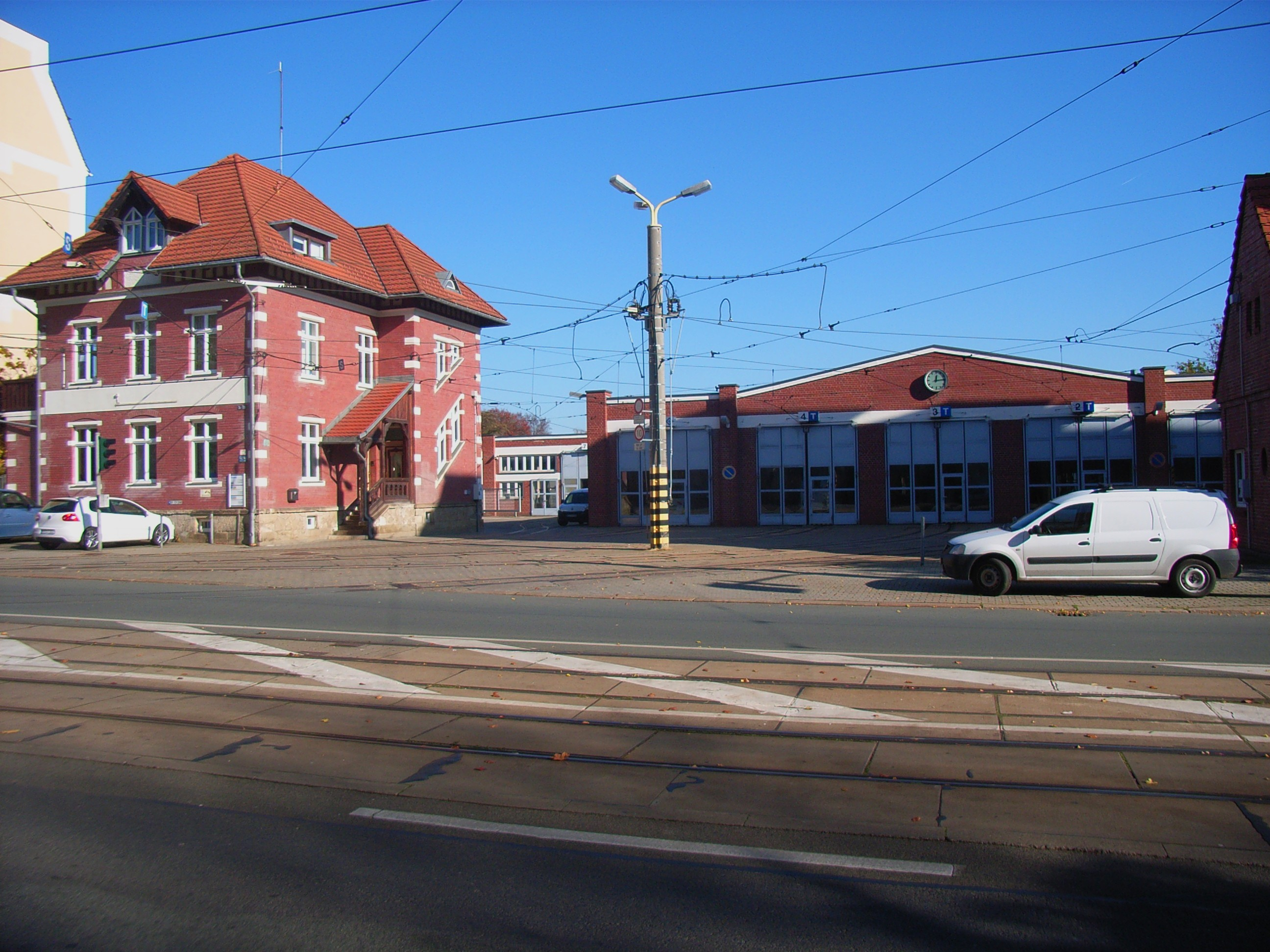 Straßenbahndepot der VGG, Görlitz